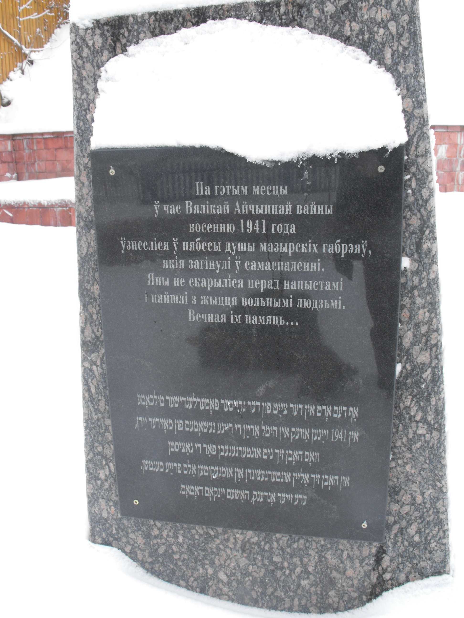 Памятник на месте дома, в котором несколько десятков мозырьских евреев повторили подвиг защитников Масады - они сожгли себя, предпочтя умереть непокорёнными.